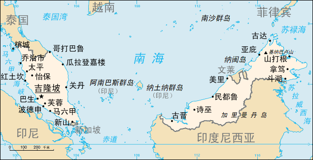 马来西亚地图。